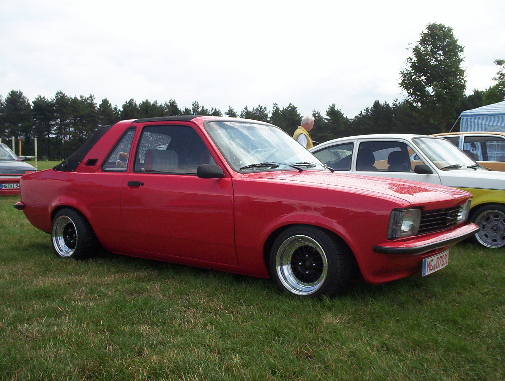 Gefotografeerd door JM Janssen